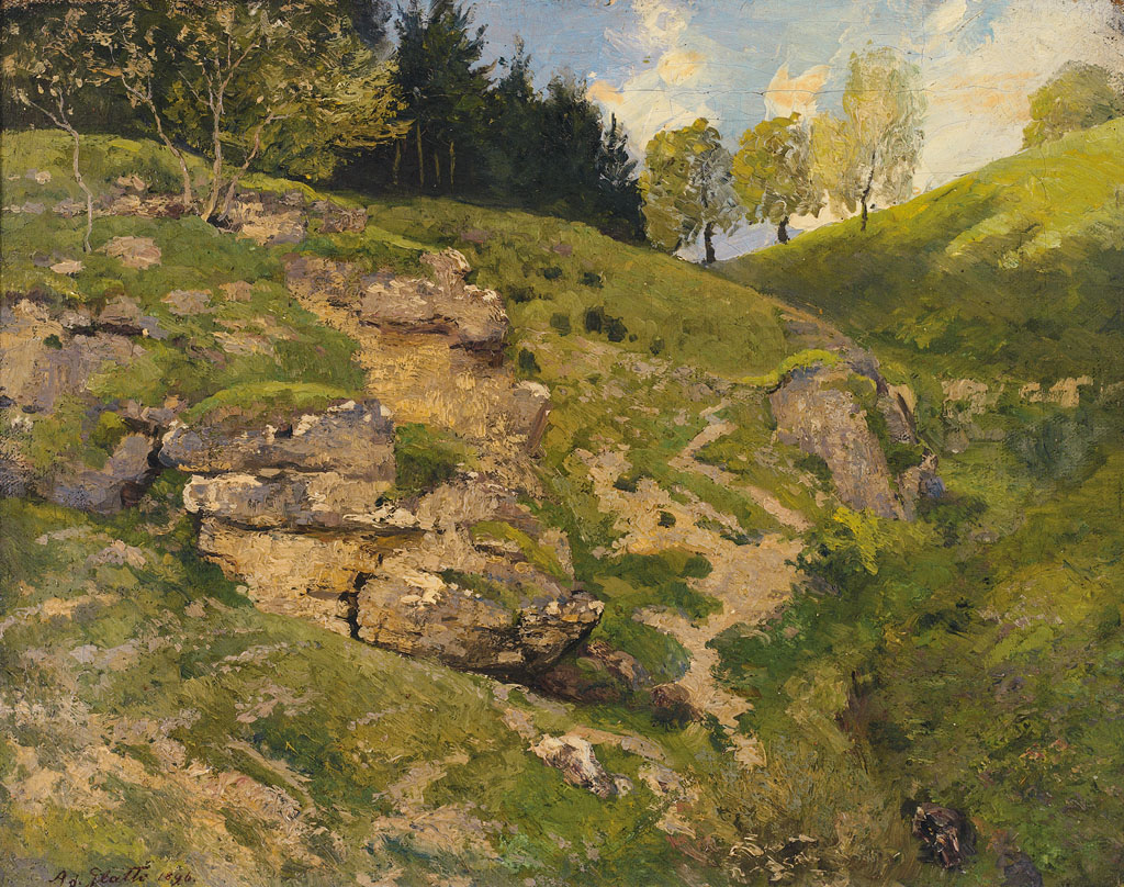 "Felsige Anhöhe bei Harburg i.B.", 1896, Öl auf Leinwand, 36 x 46,5 cm